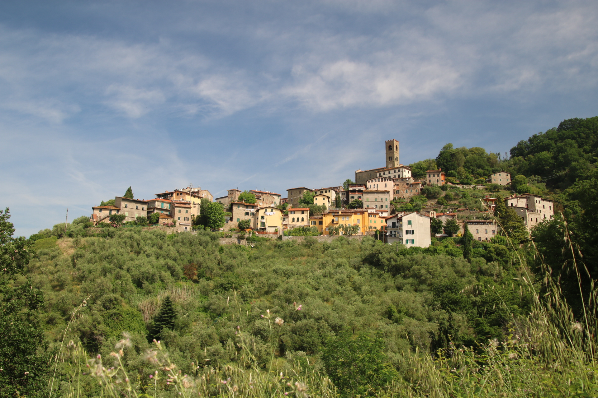 Veduta di Uzzano Castello